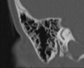 CT eines ausgeprägt pneumatisierten Warzenfortsatzes(mit hinterem Bogengang) - frontal (Blick von vorne) - schwarz: Luft